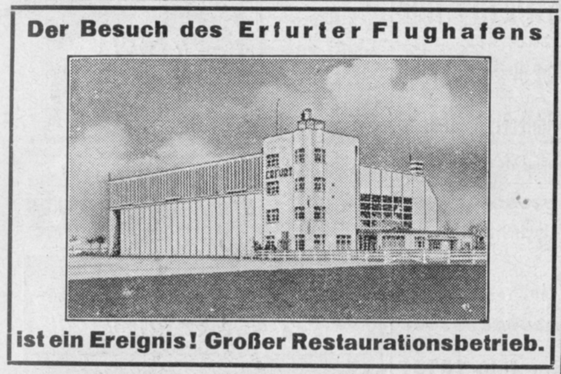 Werbeinserat zum Besuch des Flughafen-Restaurants in Erfurt.